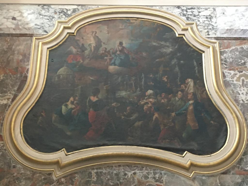 Dipinto raffigurante il miracolo degli ulivi, momento storico di Francavilla Fontana. Opera di Domenico Antonio Carella, si trova sull'altare della Madonna nella chiesa matrice.